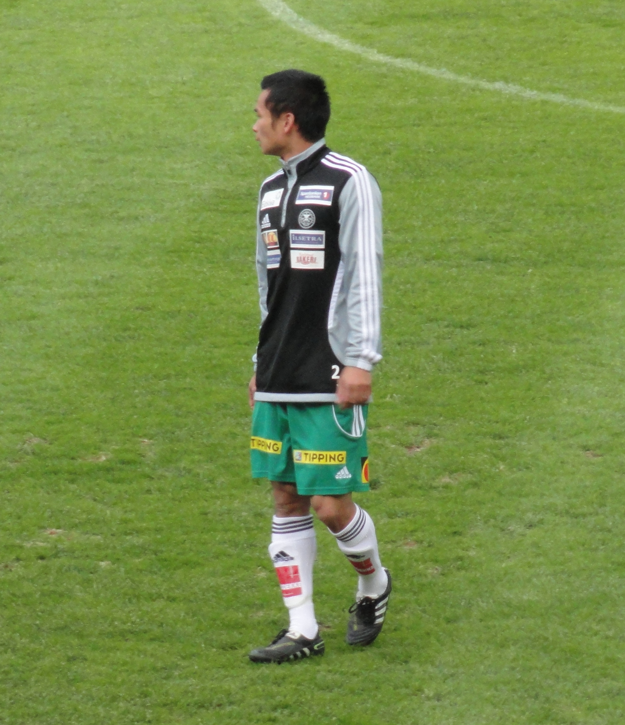 Bilde av Hai Lam